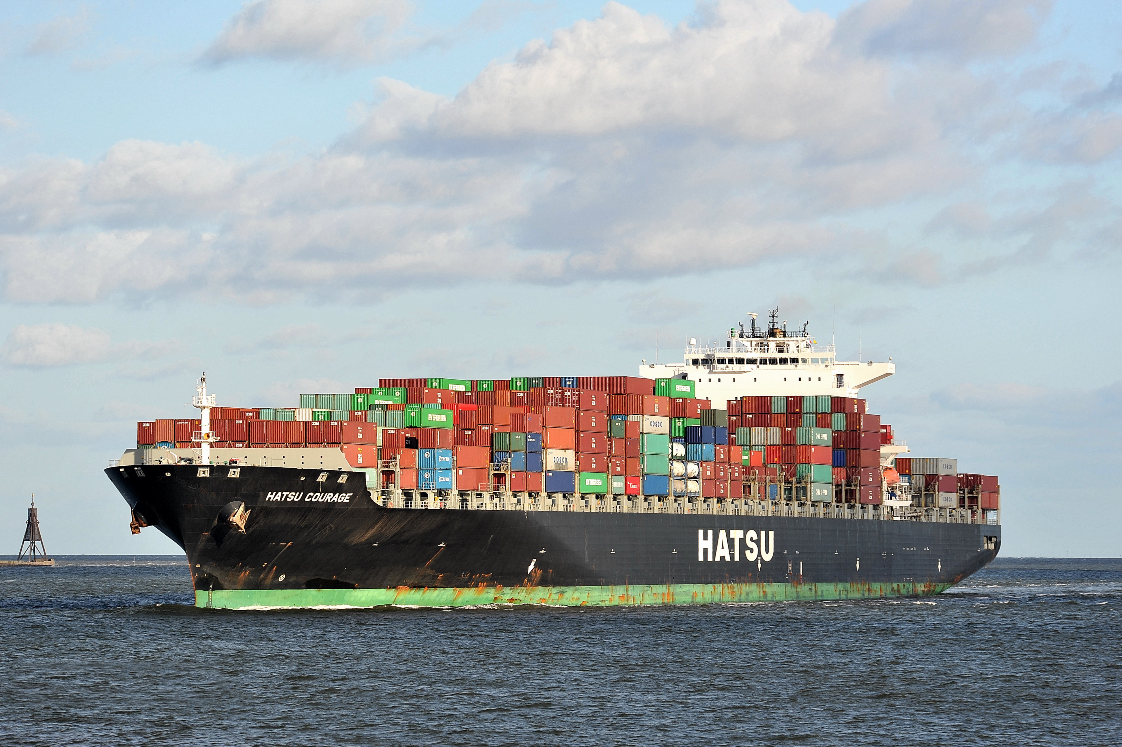 Von See kommend in der Elbmündung vor Cuxhaven, in richtung Hamburg